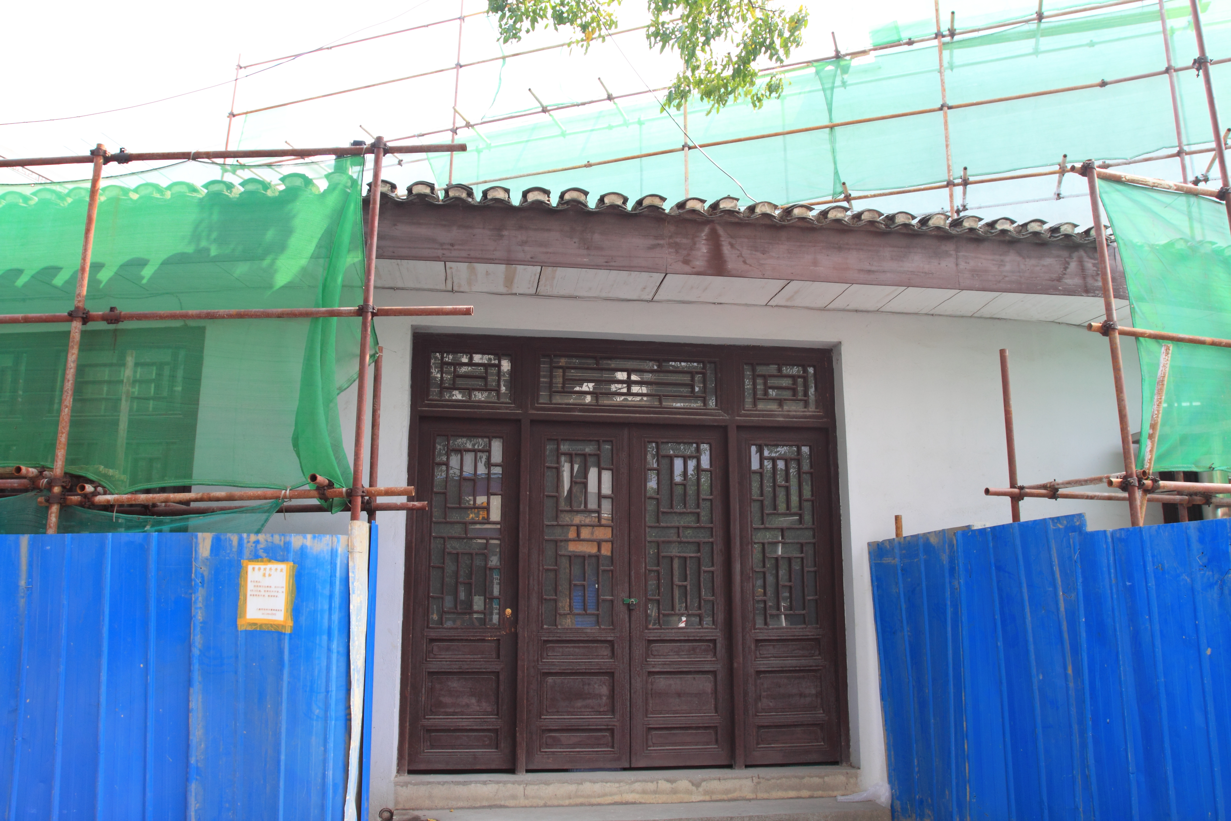 八路军桂林办事处旧址（维修中）